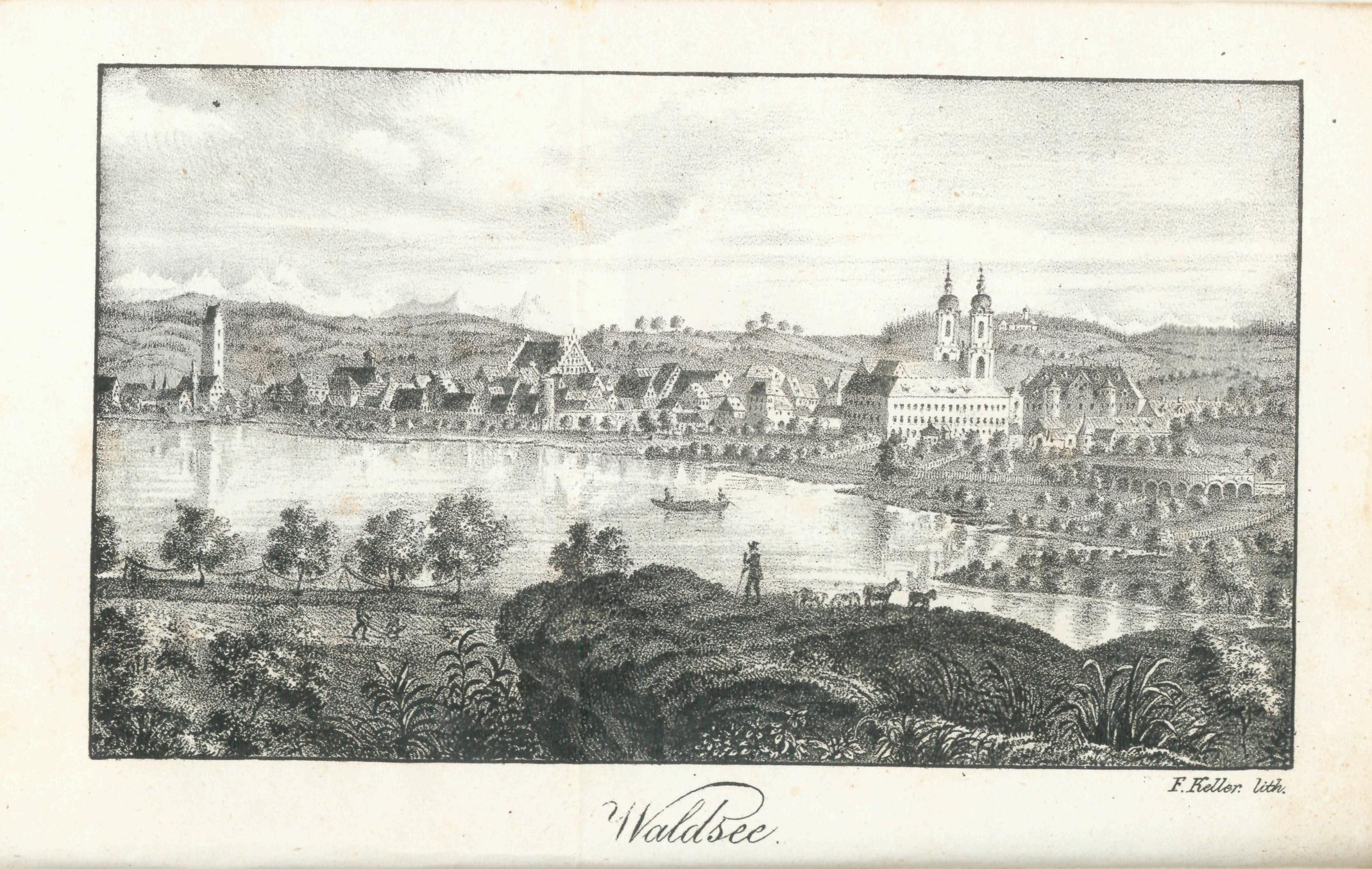 Ansicht von Waldsee, Württemberg (heute Bad Waldsee); Frontispiz des Buches: Beschreibung des Oberamts Waldsee